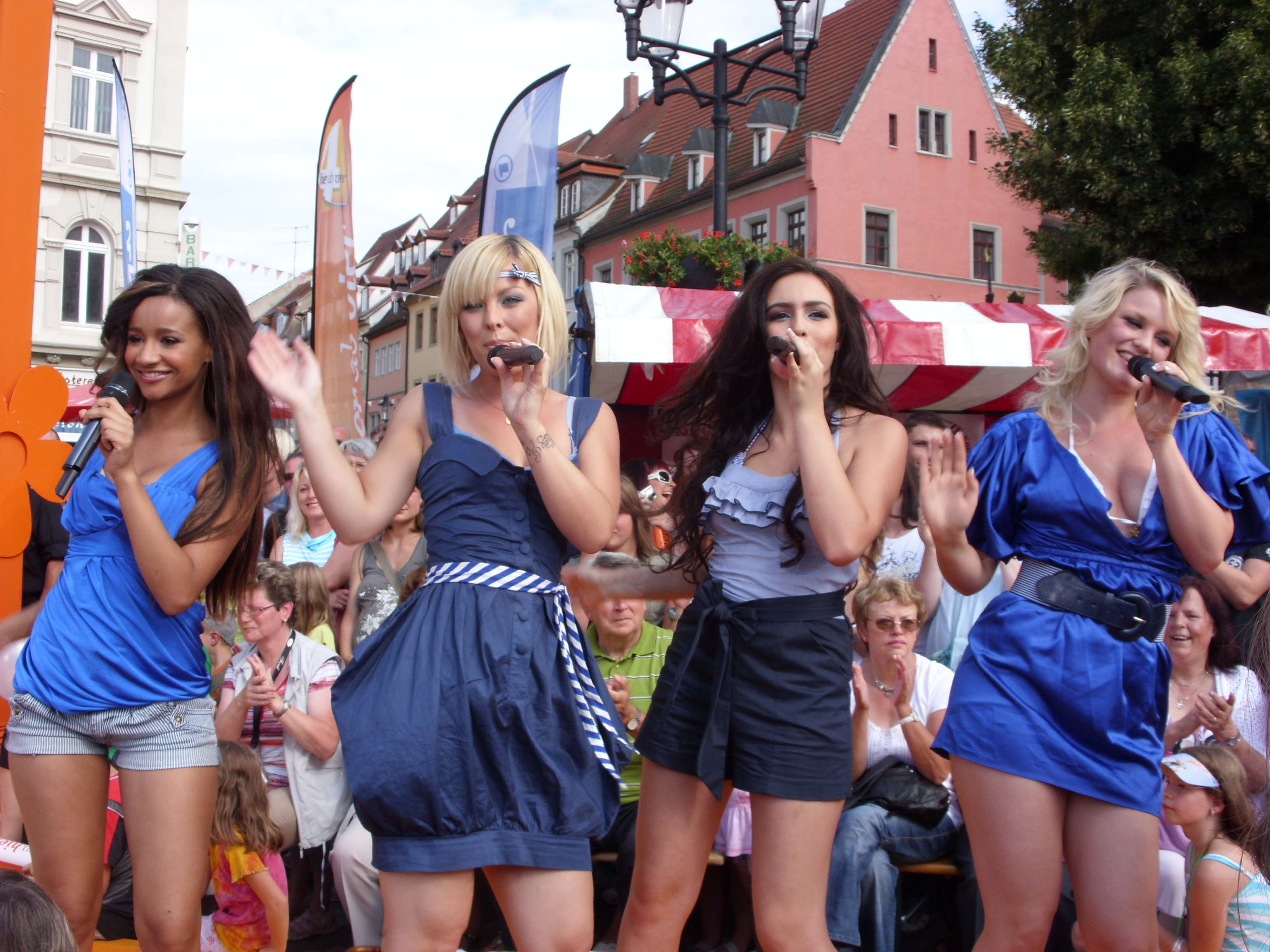 Queensberry